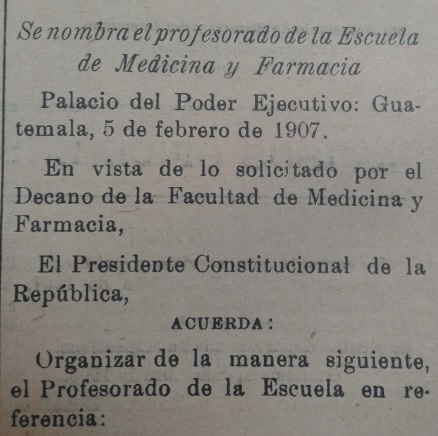 Copia de un articulo de El Guatemalteco, diario oficial en 1,907, que muestra que los profesores de la Univesidad Nacional eran designados por el Presidente de la Republica.